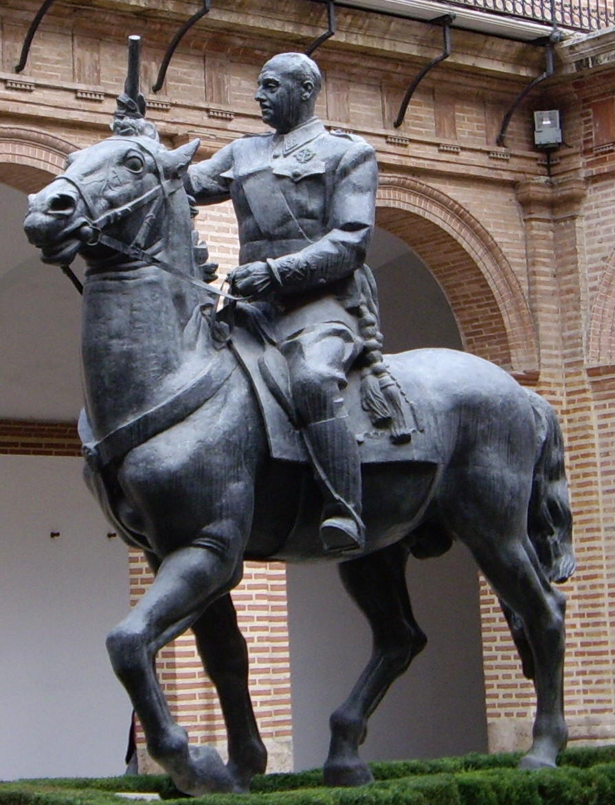 Estàtua eqüestre del dictador Francisco Franco, anteriorment a la Plaça de l'Ajuntament ara al Convent de Sant Doménec, seu de capitania General.